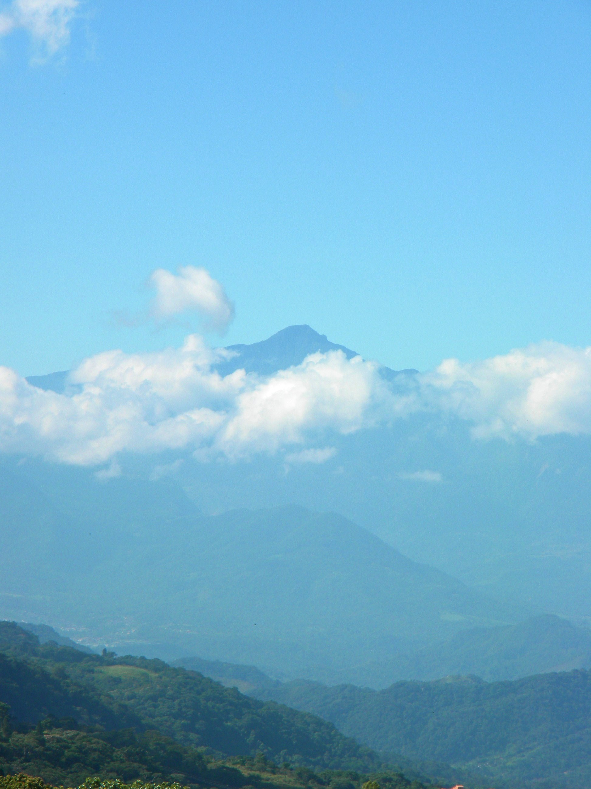 El Tamá, una de las imponentes montañas de los andes tachirenses, tal como puede verse desde la parte alta de la ciudad San Cristóbal. Esta cumbre, generalmente cubierta de nubes o atenuada por la bruma, forma parte del Parque Nacional el Tamá y su silueta distingue a esta parte de la geografía patria.